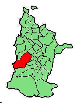 altzurukuren kokapena zuberoan